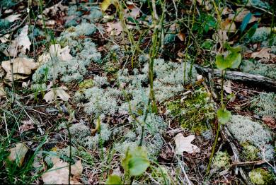 Cladonia subtenuis